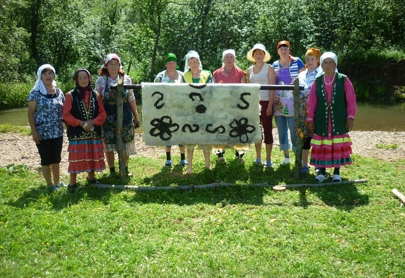 Белорецкий район. Деревня Бутаево. Валяние кошмы.